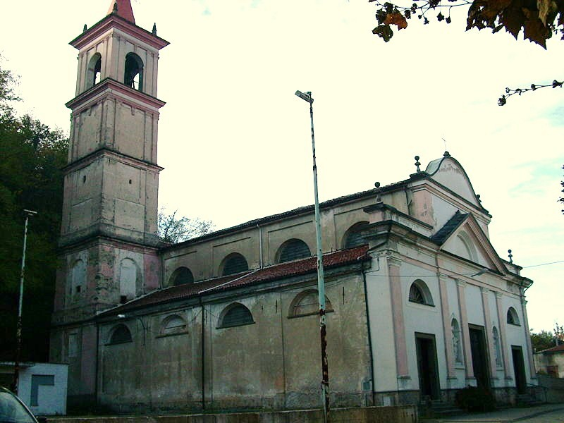 Chiesa di Sant'Ambrogio presso Dego, Liguria, Italia